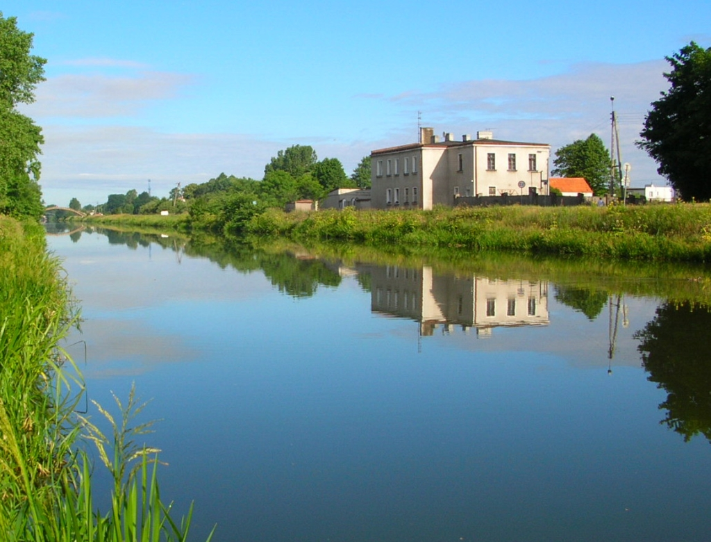 Brzeg Kanału Bydgoskiego na os. Flisy w Bydgoszczy